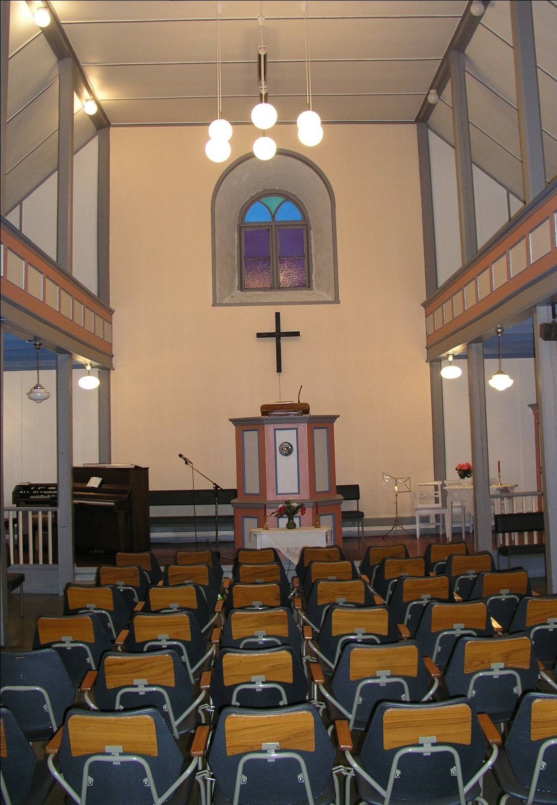 Bedehuset Bethel på Finnøy.